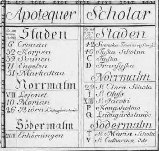 Del av Petrus Tillaeus "General Charta öfwer Stockholm med Malmarne Åhr 1733" visande förteckning över apotek och skolor